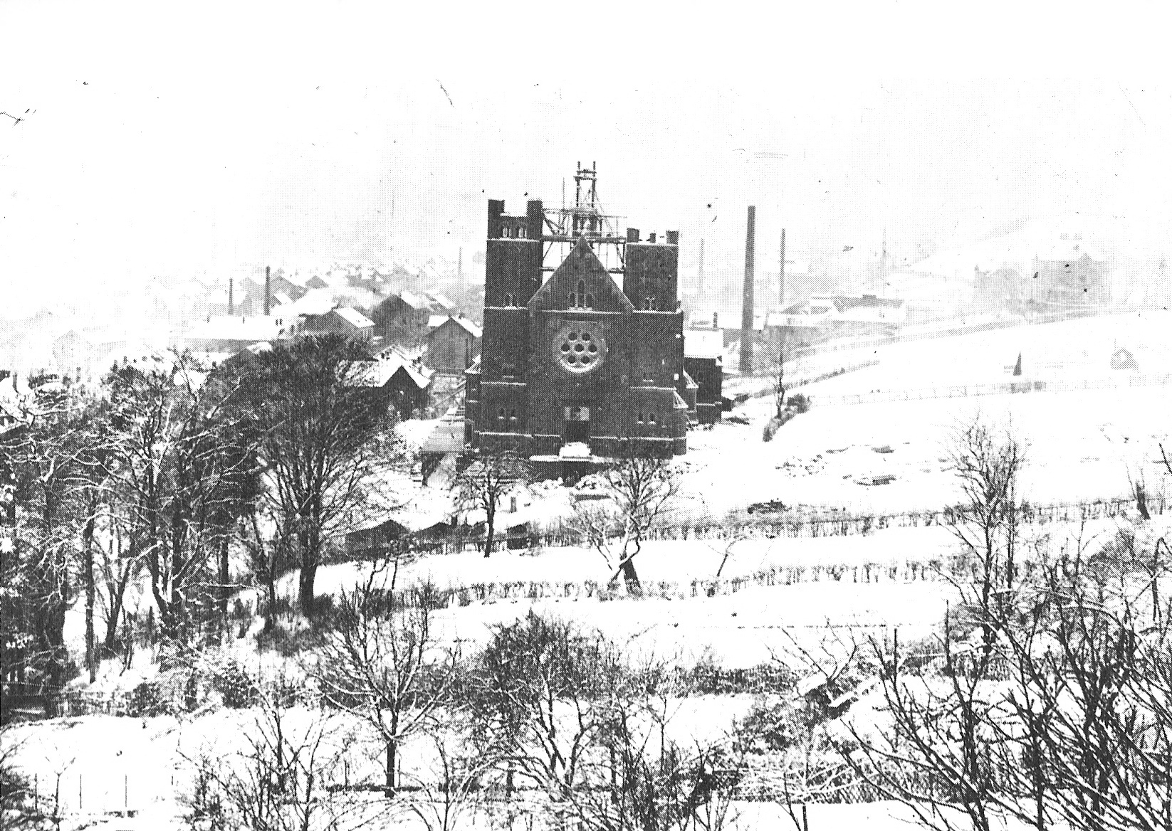 Römisch-katholische Kirche St. Michaelis am Giersberg in Siegen/Westfalen: Foto der Bauarbeiten im Winter 1904